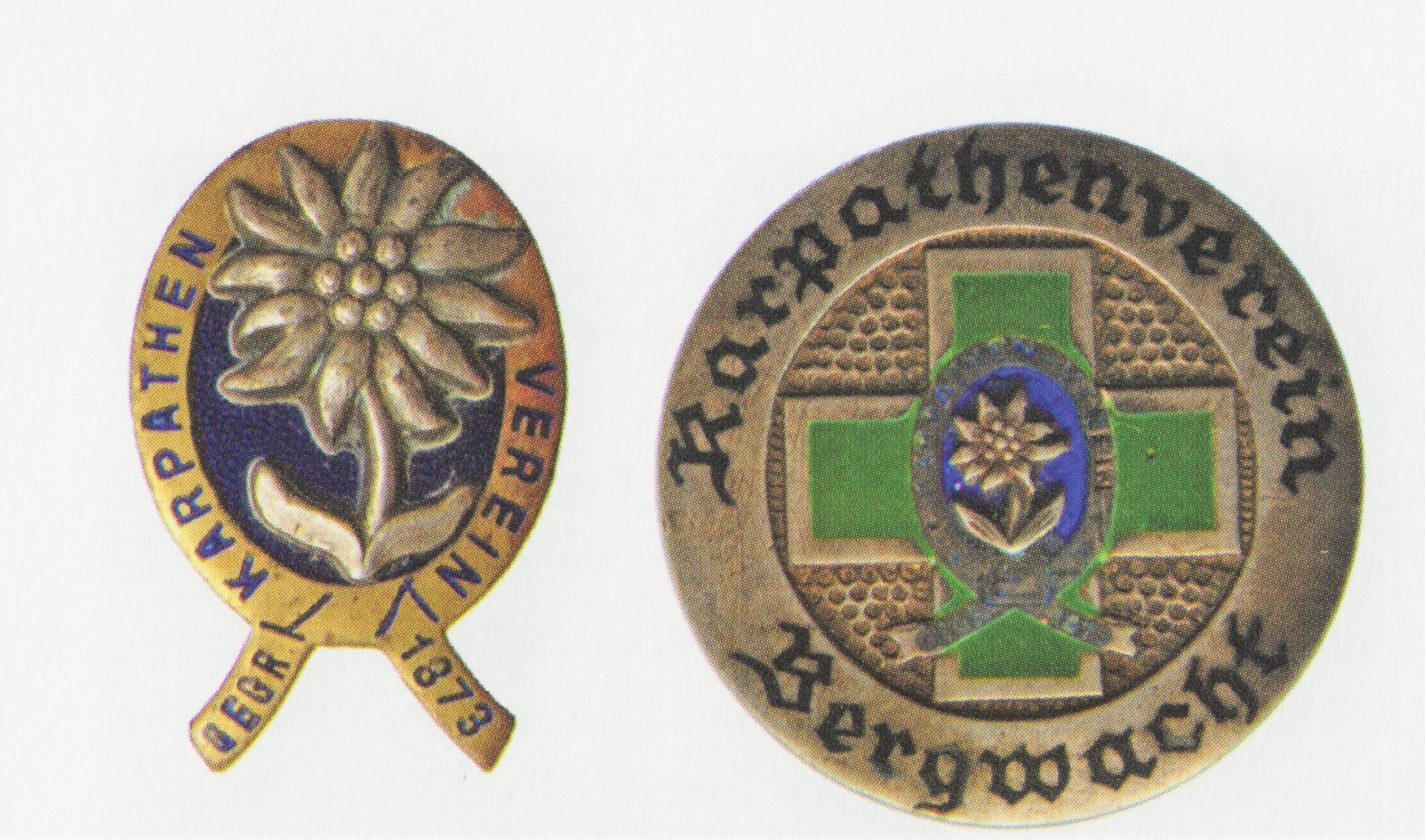 Vľavo odznak Karpatského spolku. Turistický spolok, ktorý založili po zániku Uhorského karpatského spolku nemeckí turistickí nadšenci (Spišskí Nemci) v roku 1920 v Kežmarku na Slovensku. Vpravo je odznak člena Záchranného zboru Karpatského spolku.